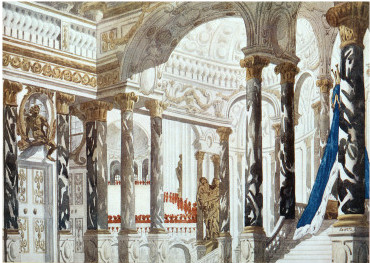 Эскиз декораций к к балета П.И.Чайковского "Спящая принцесса". 1922 Scenery Design for the Baptism, from Sleeping Beauty, 1921